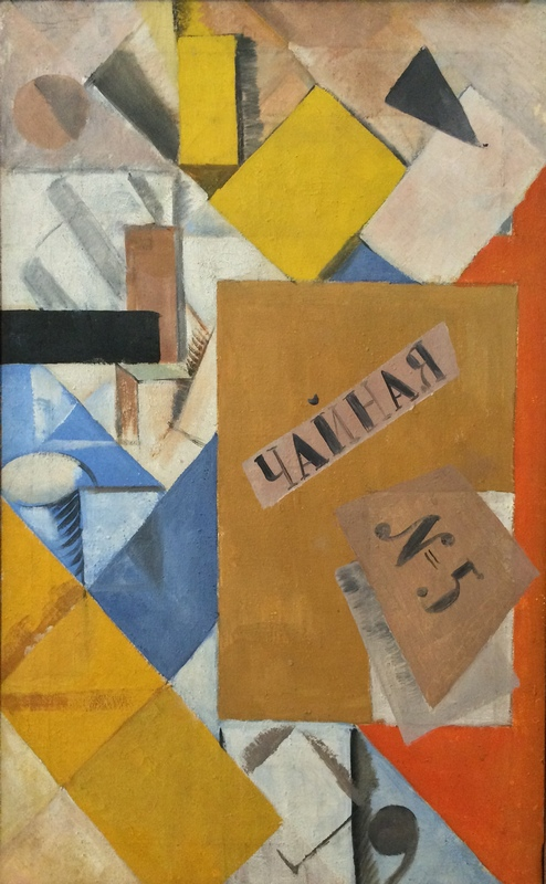 Алексей Моргунов. Чайная № 5. Калужский музей изобразительных искусств